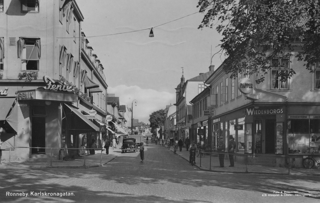 Ett fotografi med stadsvy över Karlskronagatan i Ronneby 1953 med kvarteret Olov till vänster och kvarteret Nils till höger. I bild syns konditoriet Fenix och tobakshandeln Wiedenborgs.